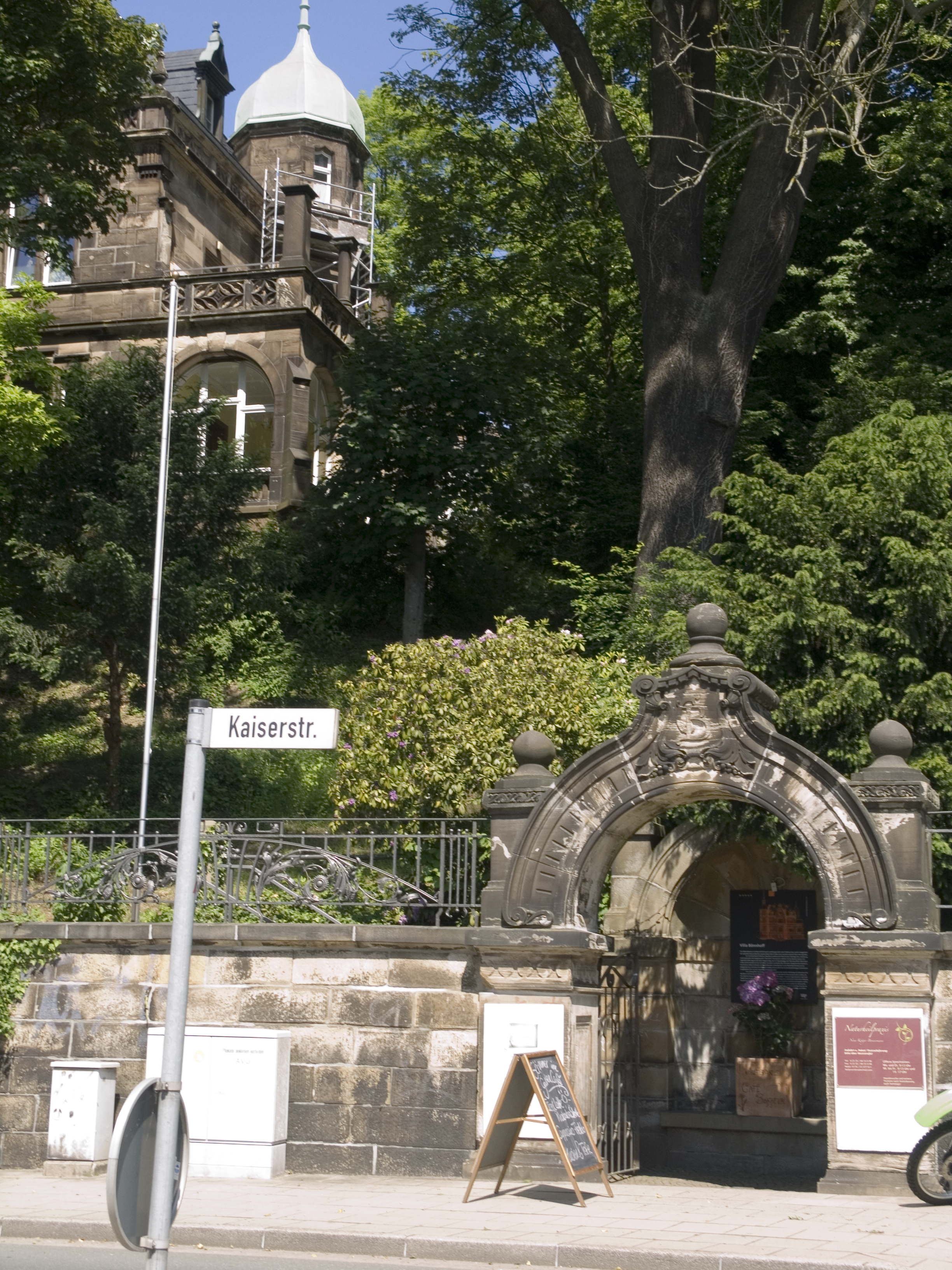 Северный Рейн - Вестфалия, Веттер (Рур) - крепость Бург Веттер